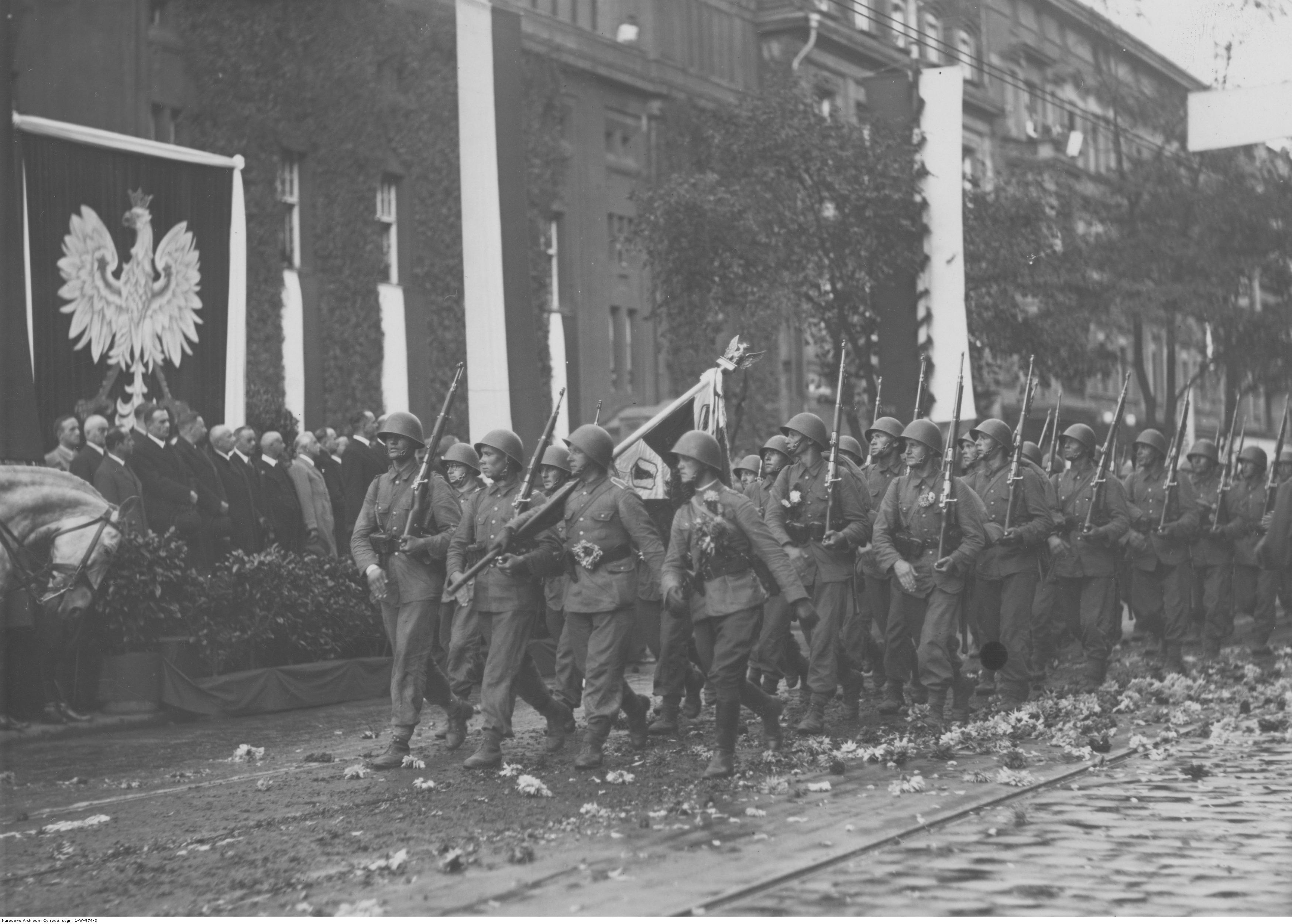 Powitanie w Katowicach 23 Górnośląskiej Dywizji Piechoty powracającej z manewrów. 73 pułk piechoty defiluje na ulicy marszałka Józefa Piłsudskiego. Koncern Ilustrowany Kurier Codzienny - Archiwum Ilustracji. Sygnatura: 1-W-974-3